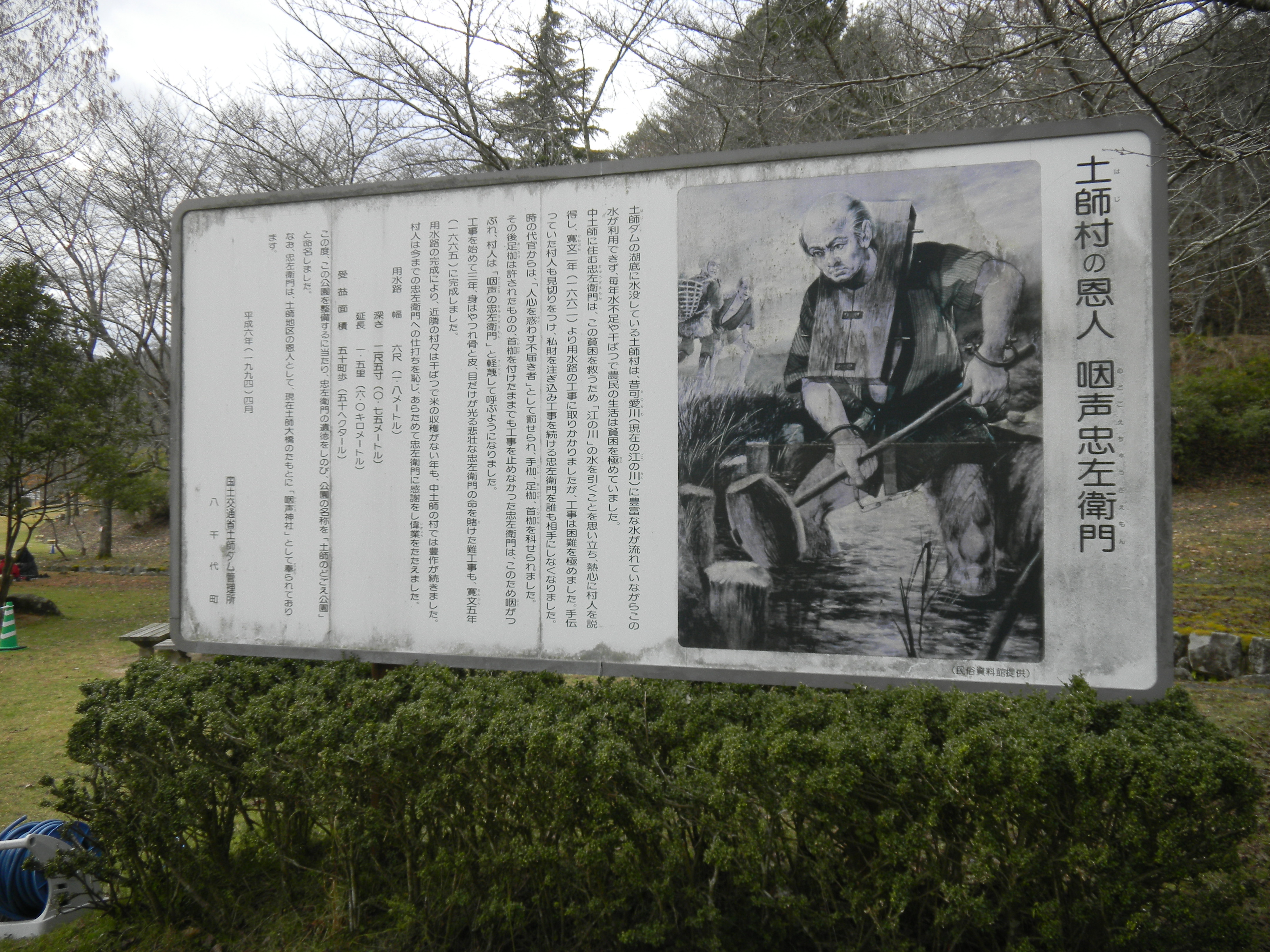 咽声忠左衛門の顕彰碑